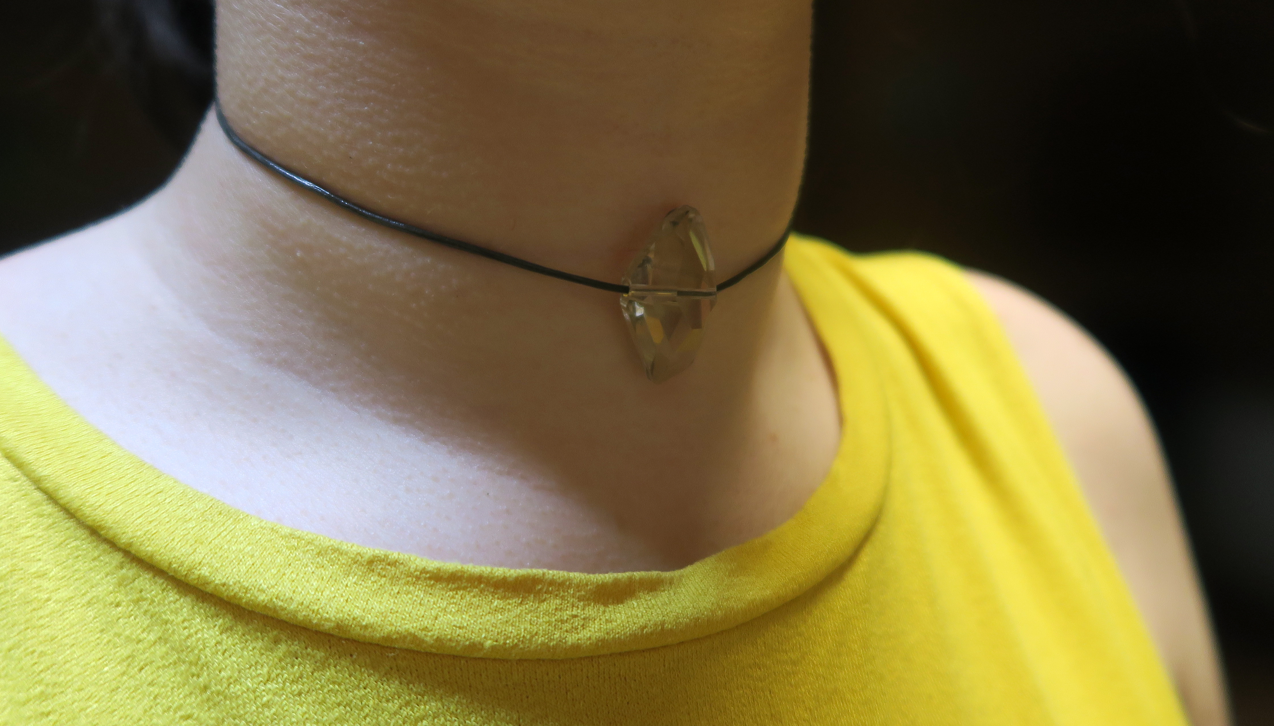 Чокър с формата на диамант